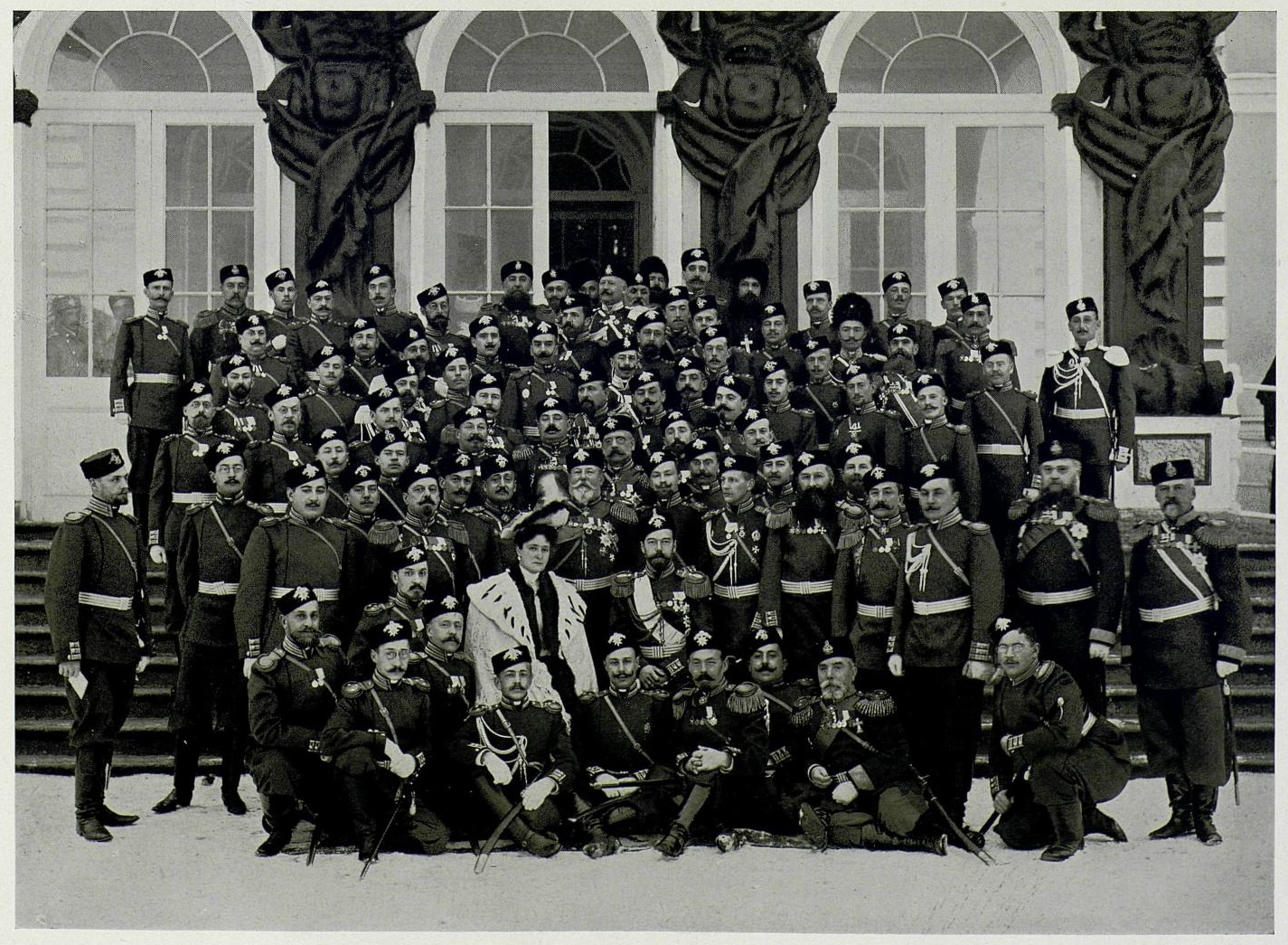 Их Императорские Величества среди Финляндцев 12 декабря 1905 года. С фотографии Гана